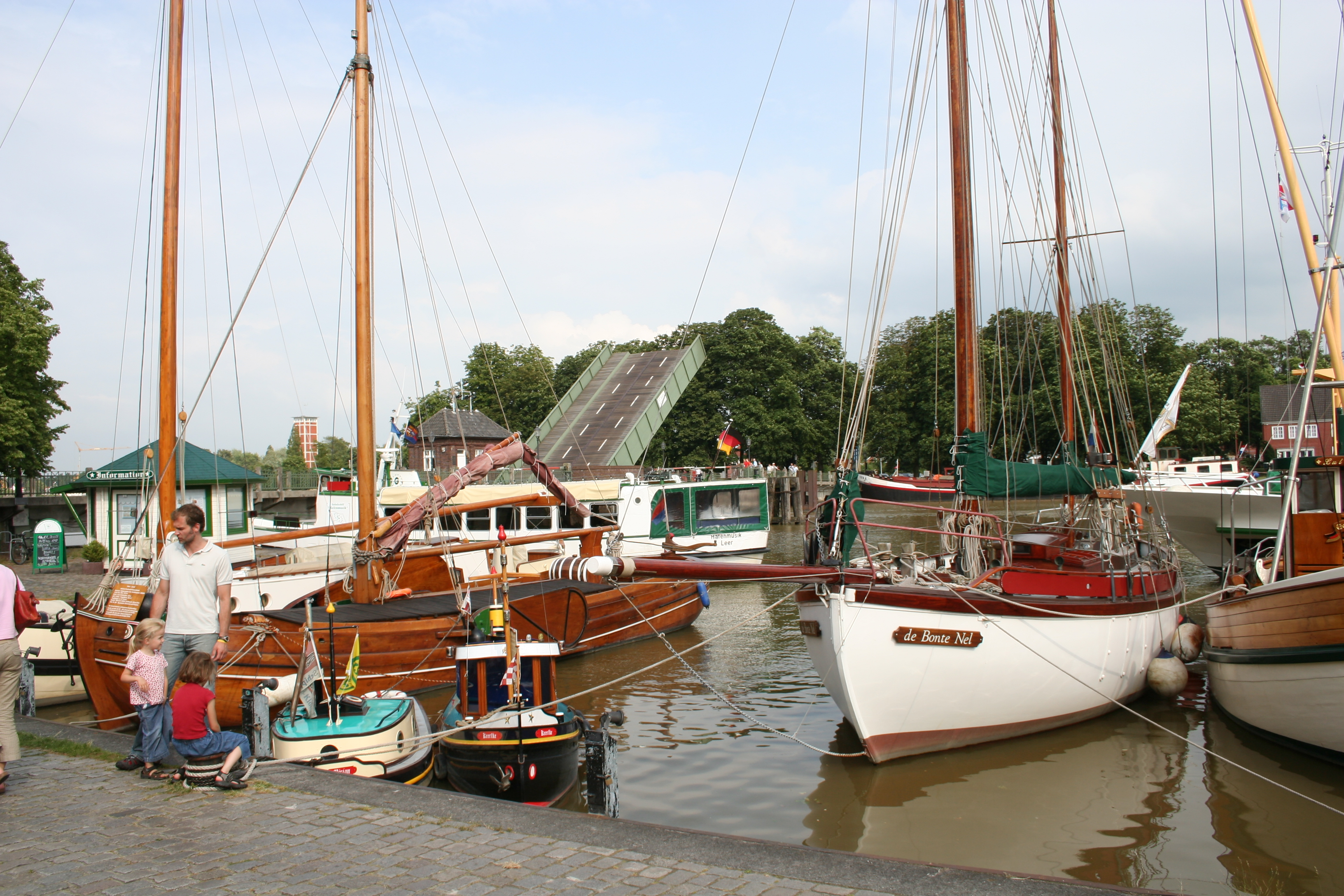 Der Museumshafen in Leer (Ostfriesland). Im Hintergrund ist die Dr-vom-Bruch-Brücke zu sehen.